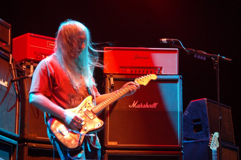 Dinosaur Jr at FIB (Benicàssim).